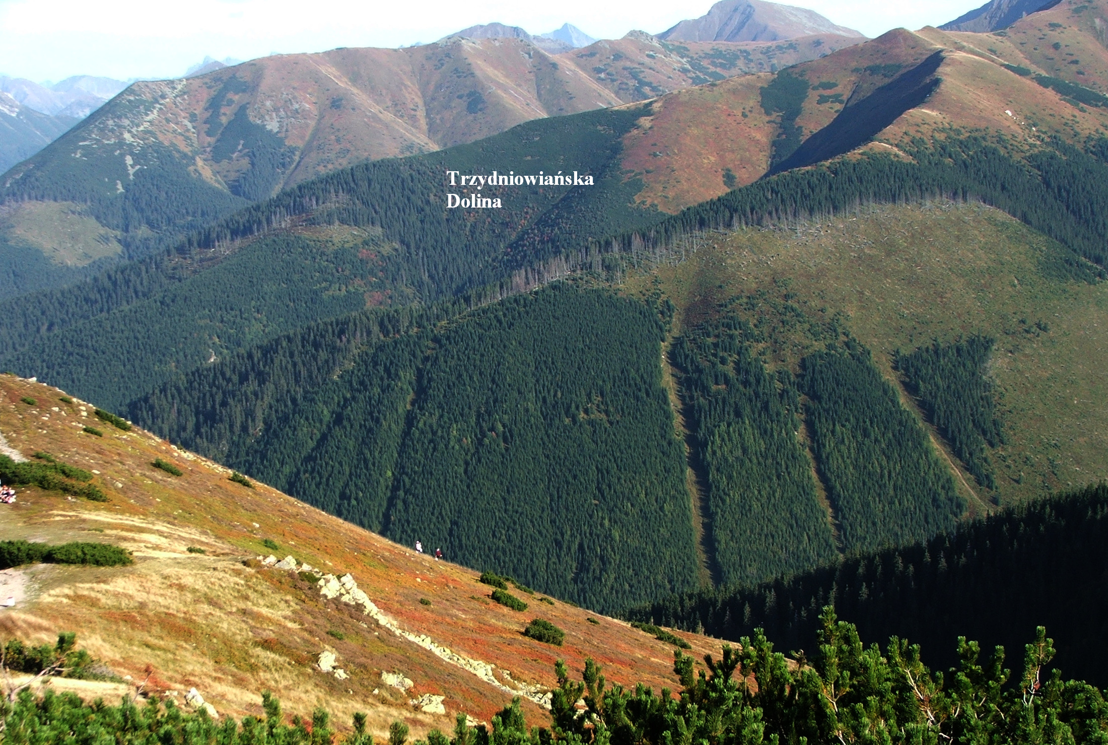 Trzydniowiańska Dolina (West Tatra Mountains)